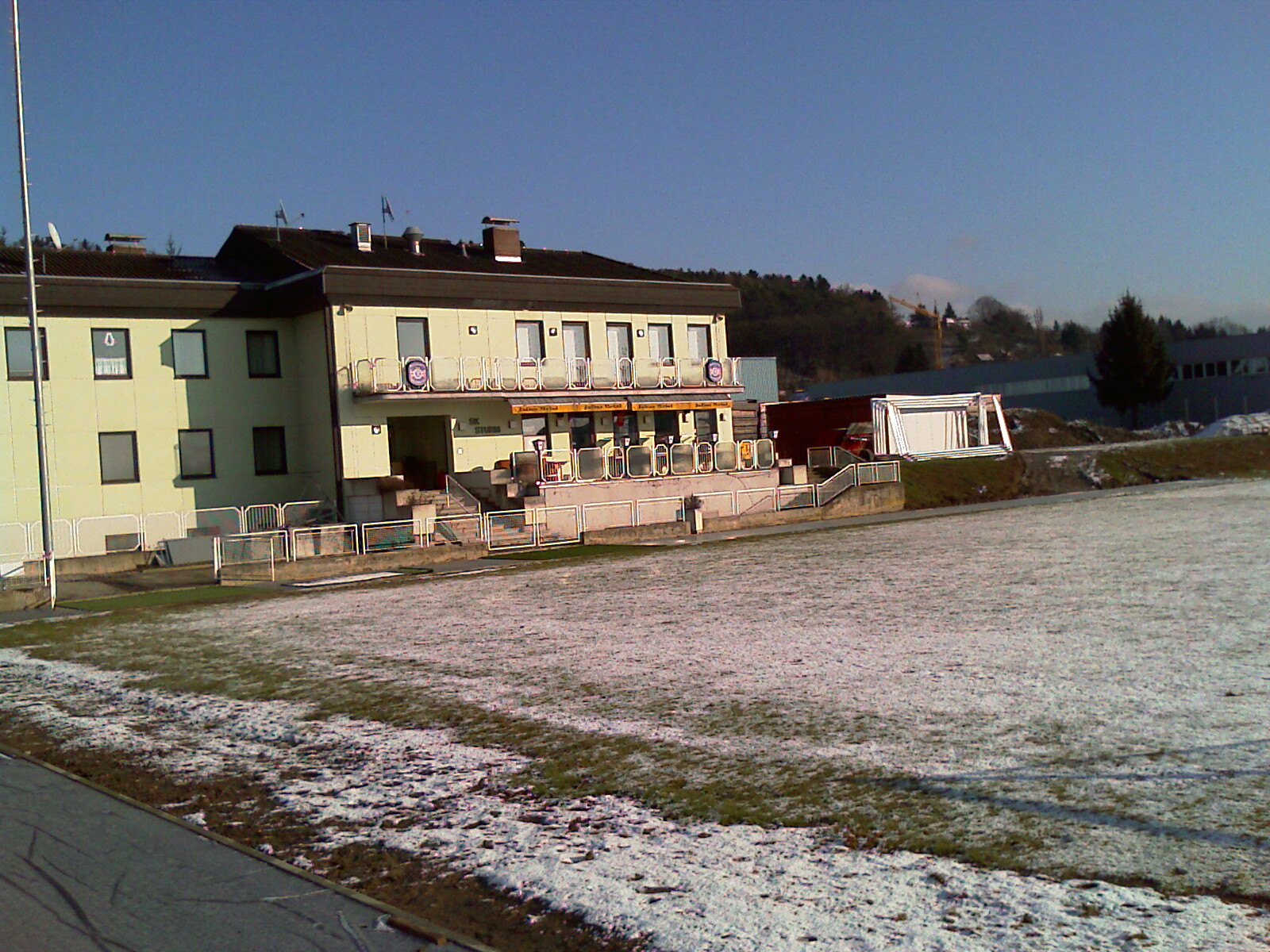 Trainingszentrum Messendorf des SK Sturm Graz